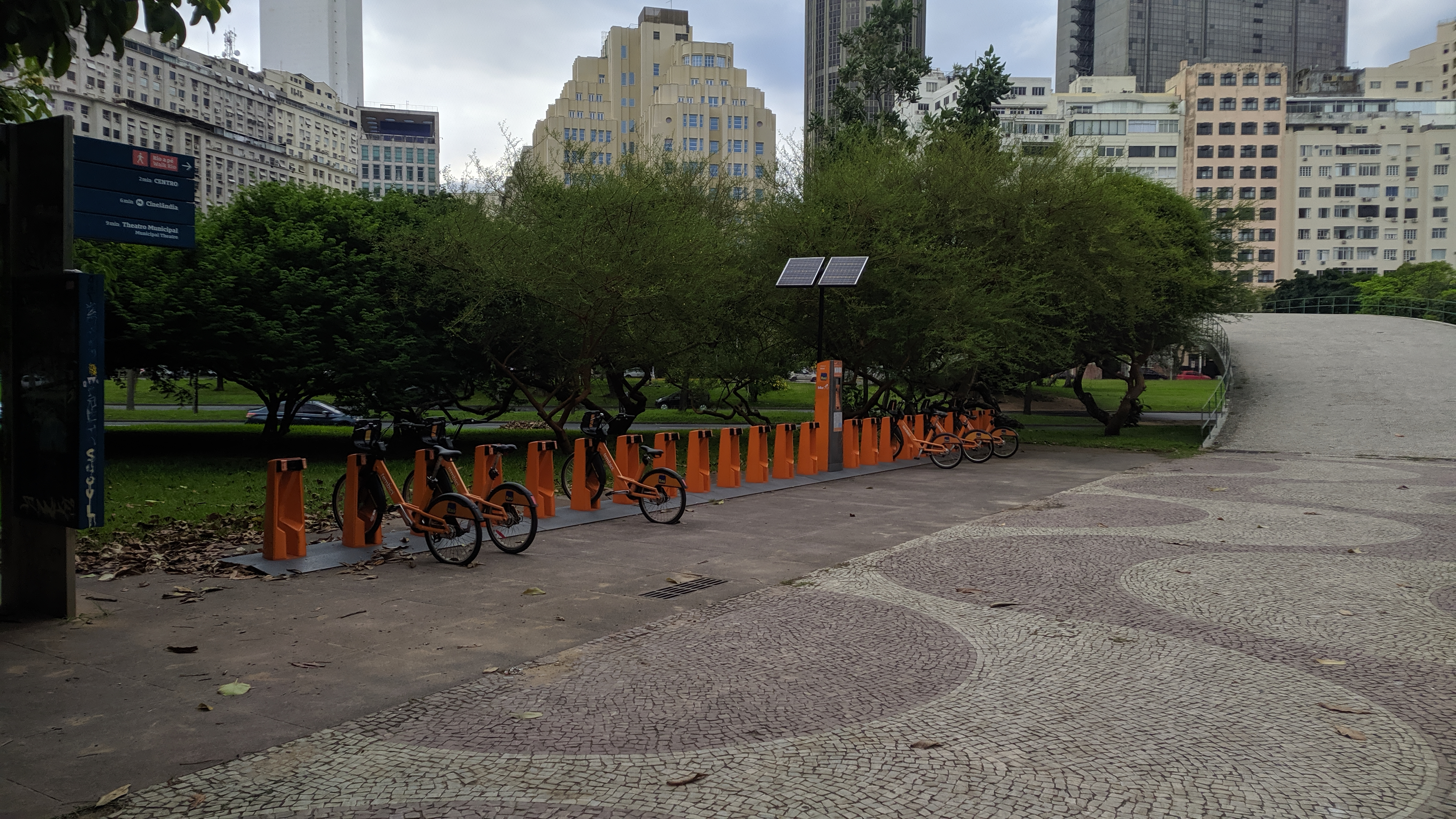 Estação do Bike Rio com auto atendimento localizado ao lado do Museu de Arte Moderna do Rio de Janeiro.